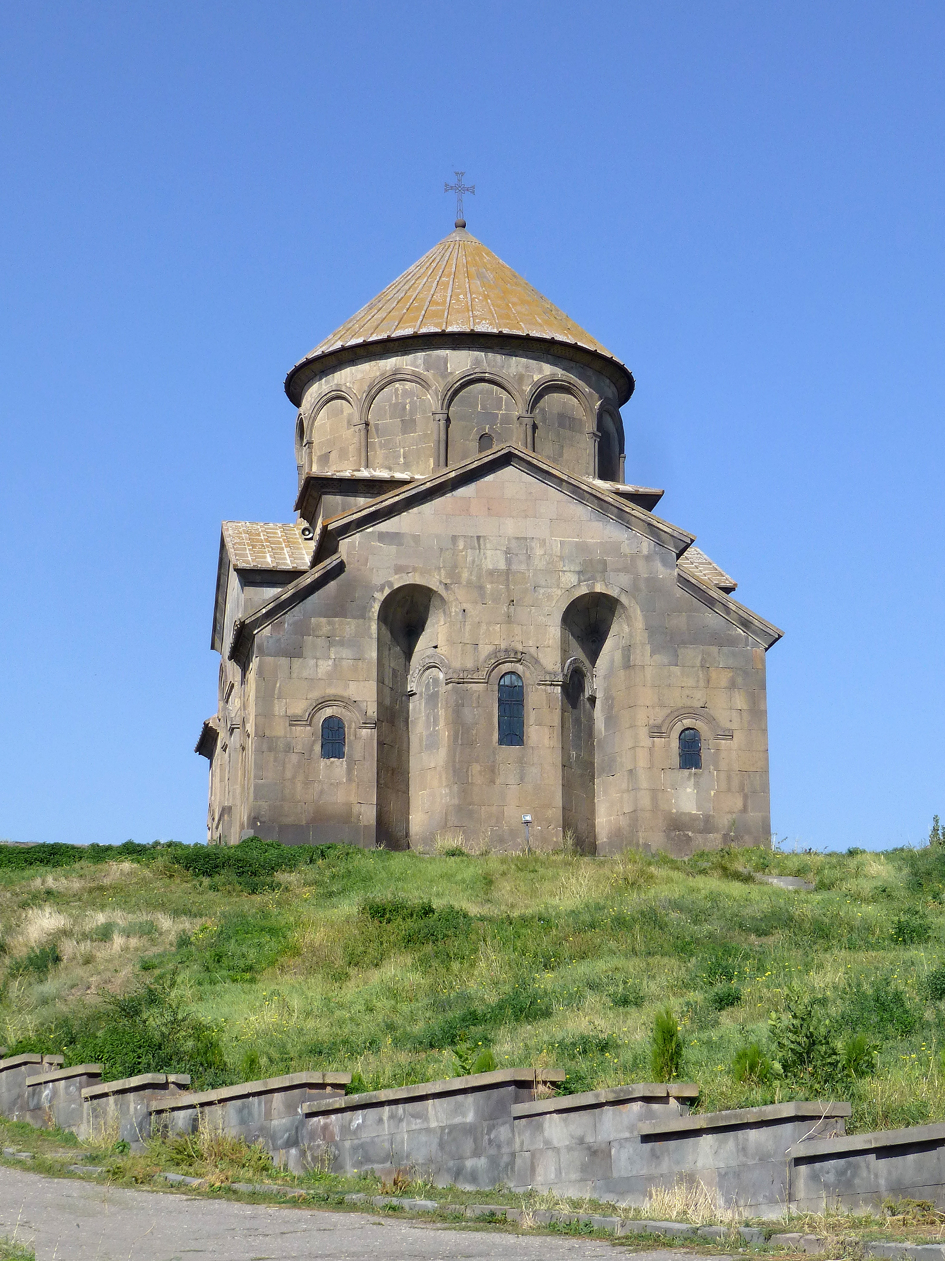 Eglise Surb Hovhannes à Sissian (Arménie).